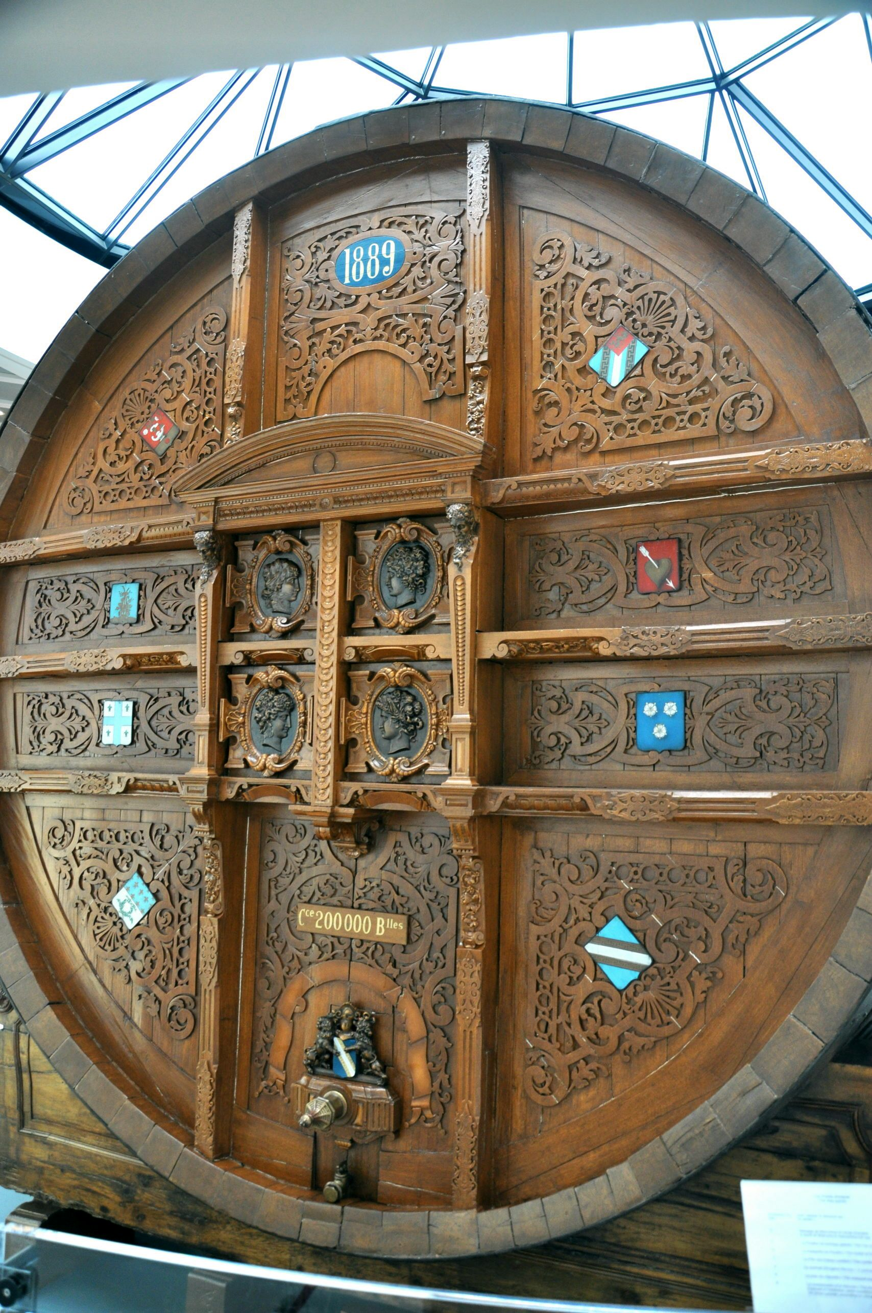 Das 200.000 Flaschen fassende Eichenfass von Mercier (Champagner) zur Weltausstellung 1889 in Paris